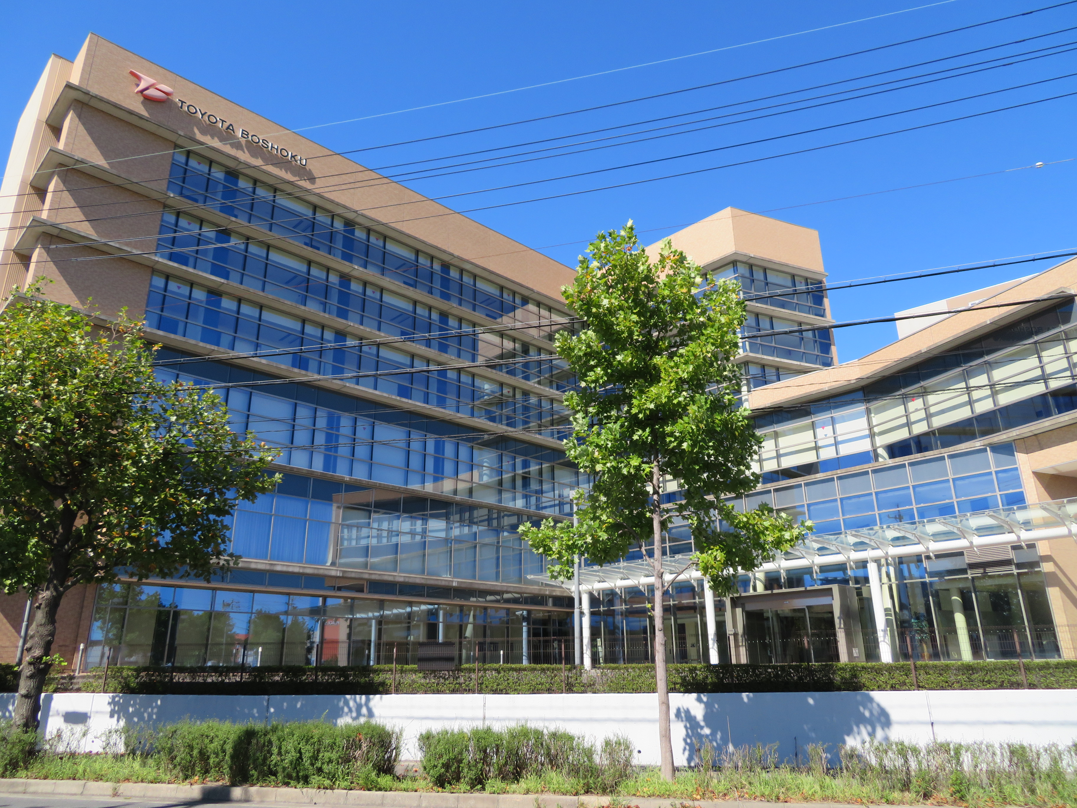 トヨタ紡織グローバル研修センター（豊田市大林町）